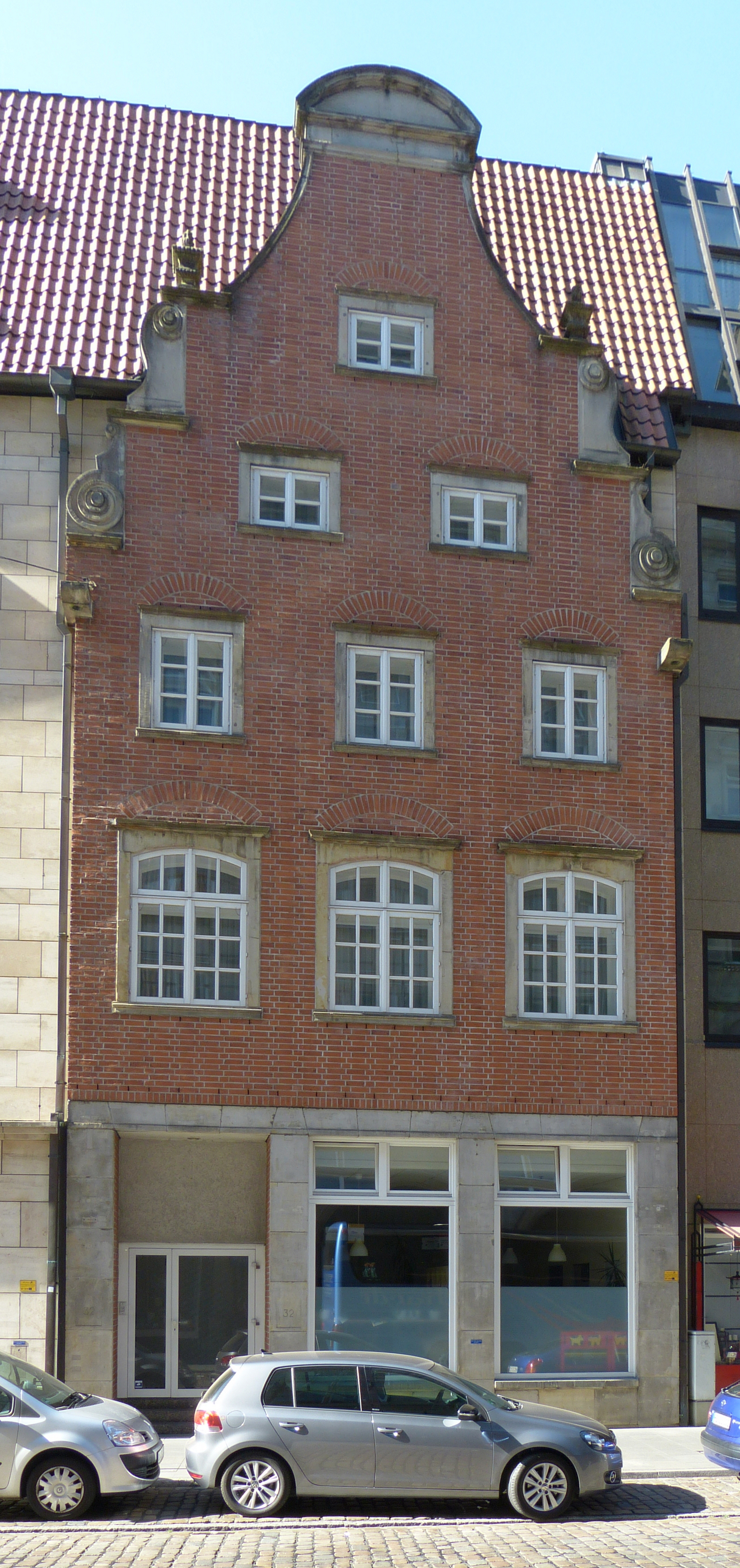 Bremen-Amerika-Bank in Bremen, Wachtstraße 32Das abgebildete Objekt ist ein geschütztes Kulturdenkmal in der Freien Hansestadt Bremen, mit der Nr. 1192 beim Landesamt für Denkmalpflege registriert.